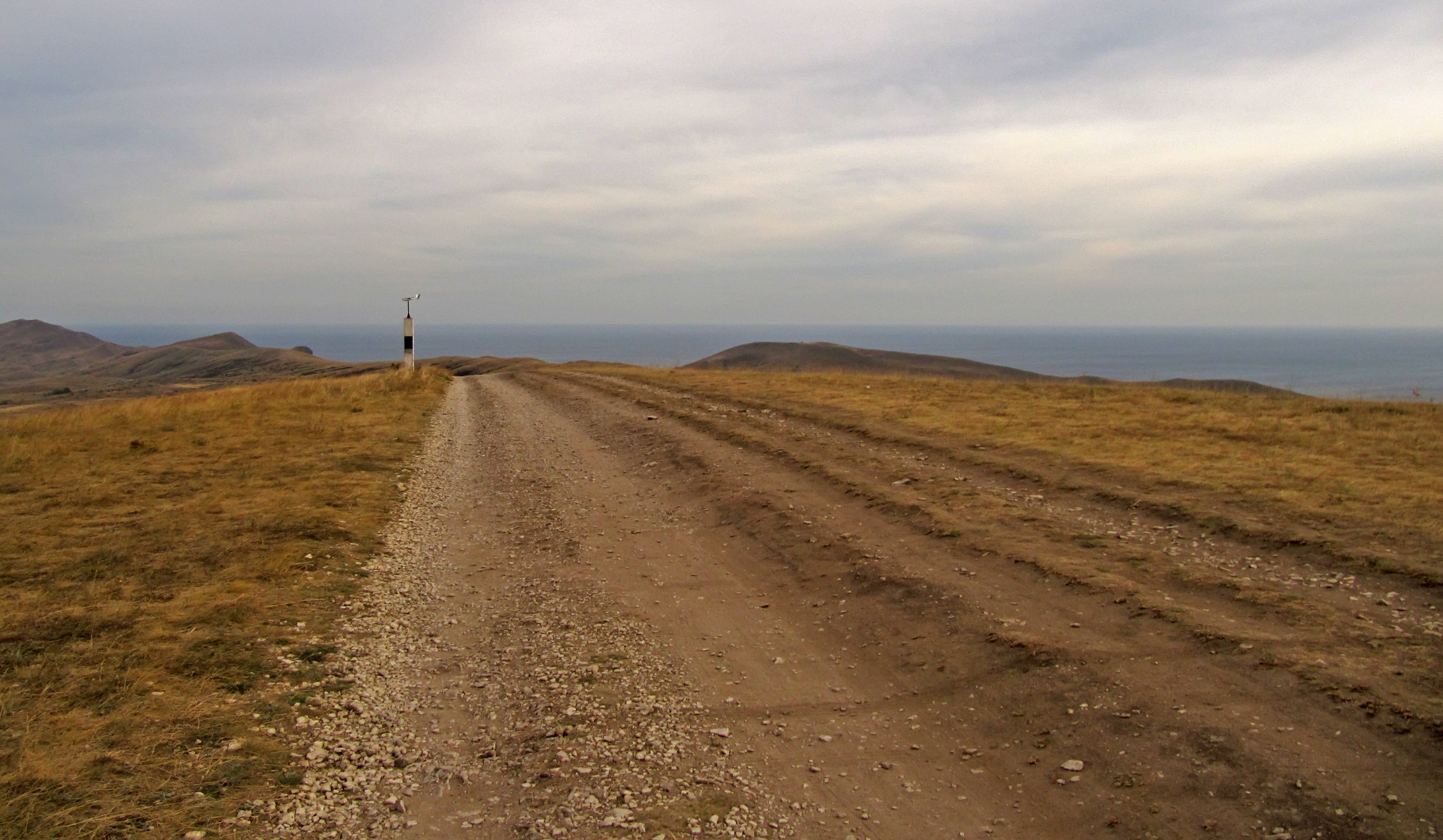 «Воздухоплавний комплекс „Узун-Сирт, гора Клементьева“», с. Первомайське (Кіровський р-н), с. Насипне, с. Коктебель (м. Феодосія)